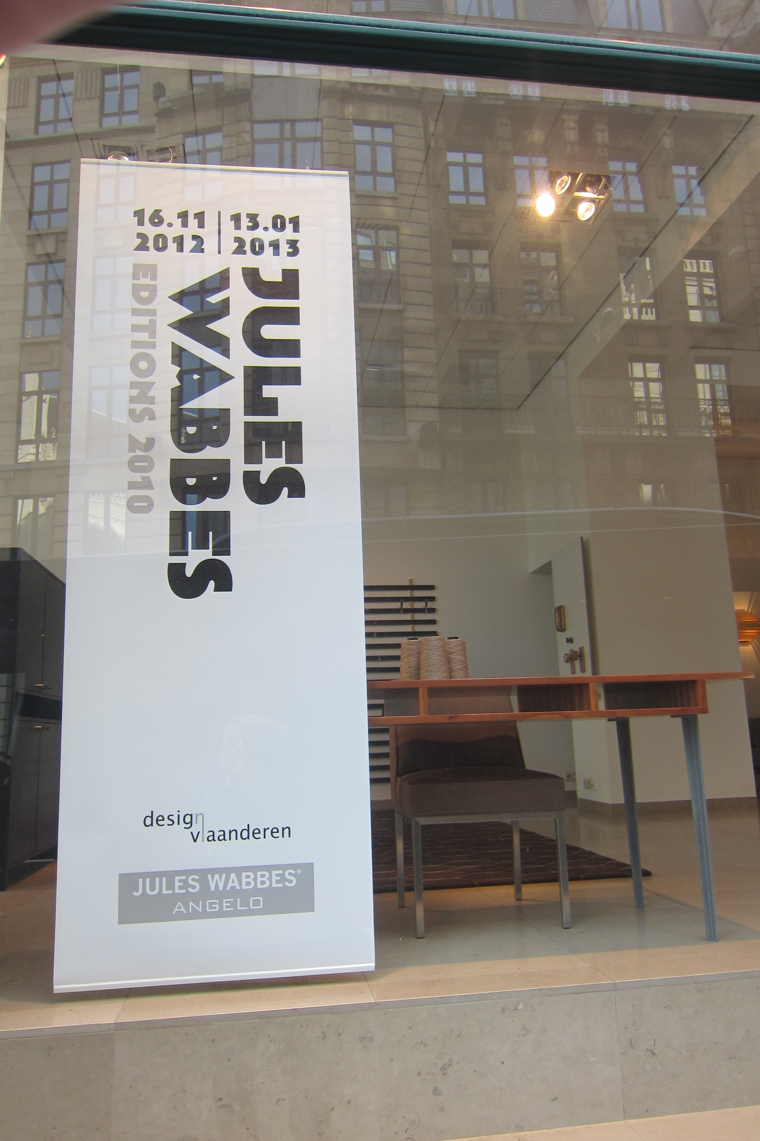 Tentoonstelling te Brussel werk Jules Wabbes met tafel Gérard Philipe